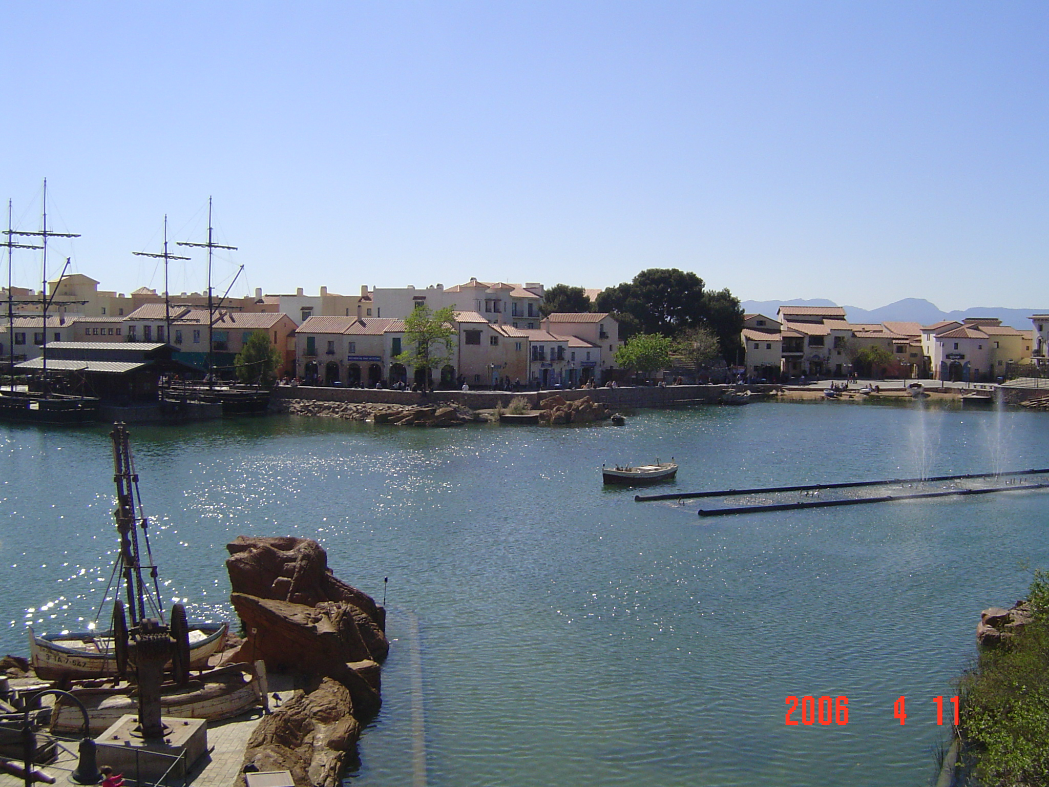 Foto do lago na área temática Mediterranea, no parque Port Aventura.